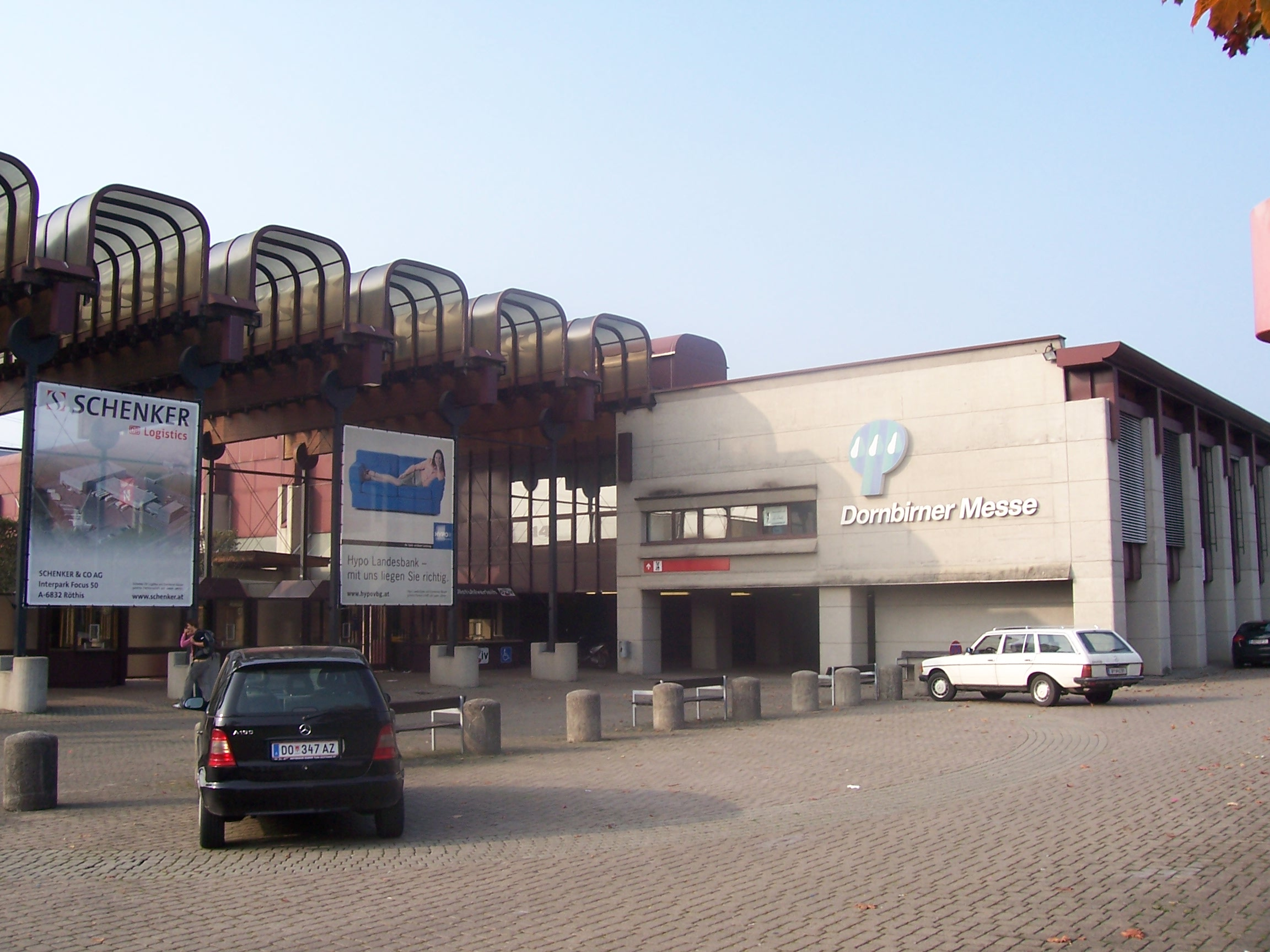 Main entrance of the Dornbirner Messe. / Haupteingang der Dornbirner Messe.